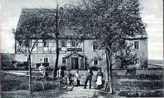 Fürstenwalde Oberer Gasthof